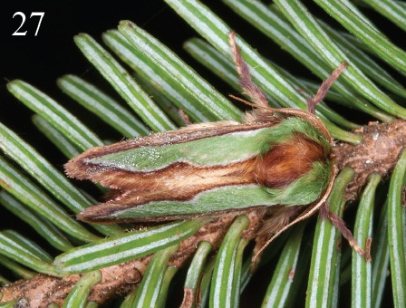 Parasa pygmy